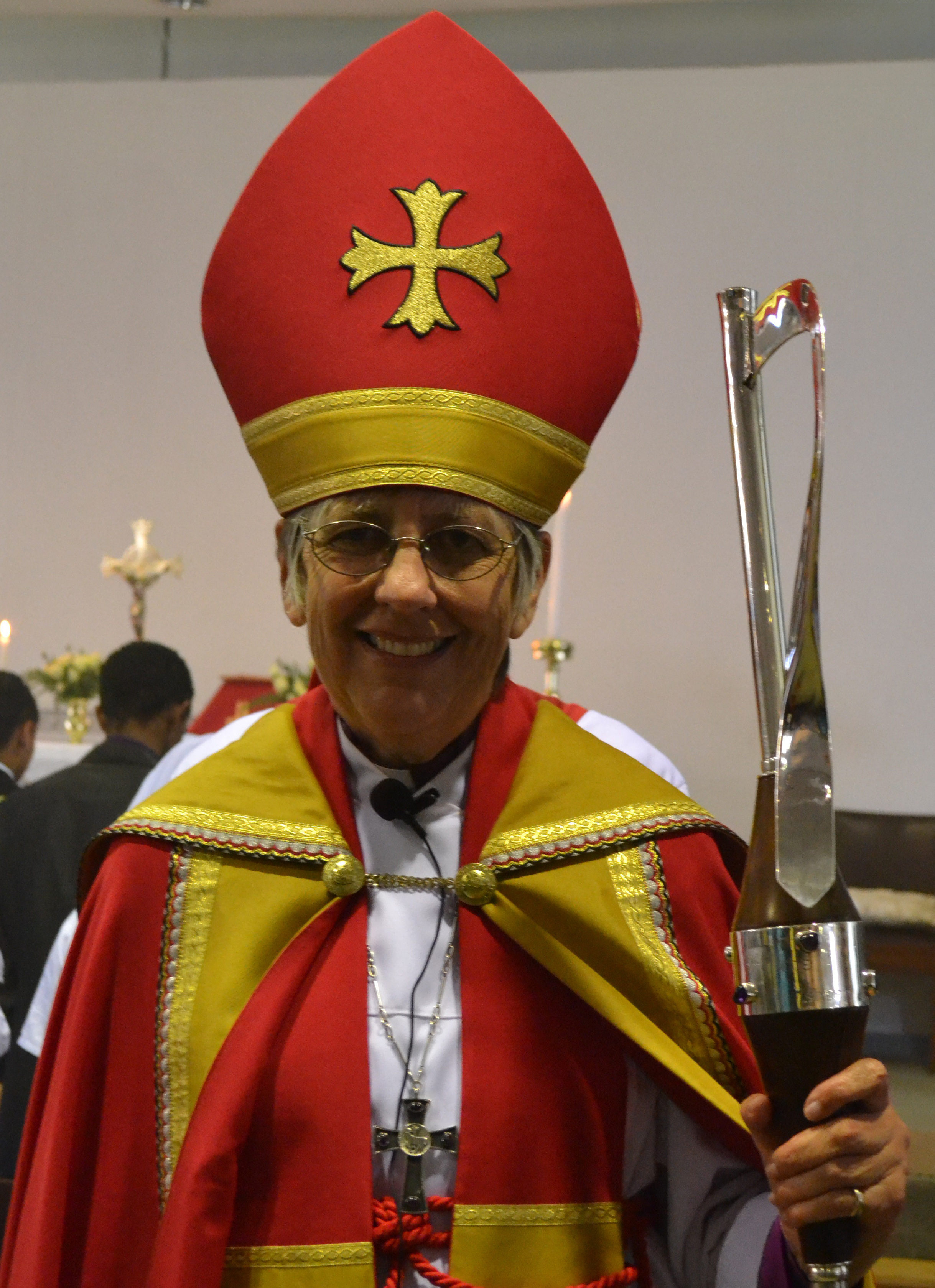 ગુજરાતી: Margaret Vertue